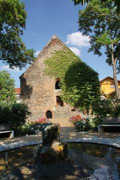 Ansicht aus Semmelweißpark